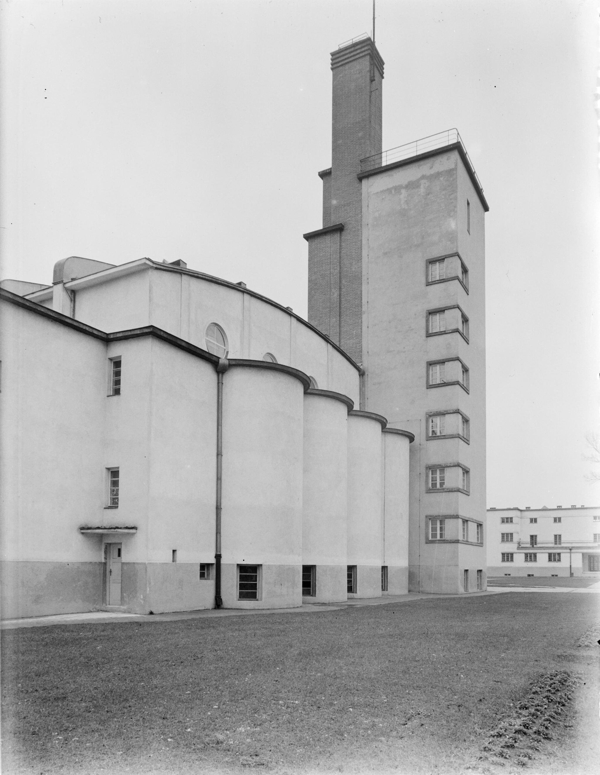 Collectie / Archief : Fotocollectie Van de Poll Reportage / Serie : Reis naar Polen Beschrijving : Warschau. Centraal instituut voor lichamelijke opvoeding Annotatie : Tussen 1928 en 1930 in functionalistische vormen opgetrokken complex naar ontwerp van Edgar Norwerth Datum : 1934 Locatie : Polen, Warschau Trefwoorden : architectuur, functionalisme, lichamelijke opvoeding, onderwijs, scholen, torens Persoonsnaam : Norwerth, Edgar Fotograaf : Poll, Willem van de Auteursrechthebbende : Nationaal Archief Materiaalsoort : Glasnegatief Nummer archiefinventaris : bekijk toegang 2.24.14.02 Bestanddeelnummer : 190-0855